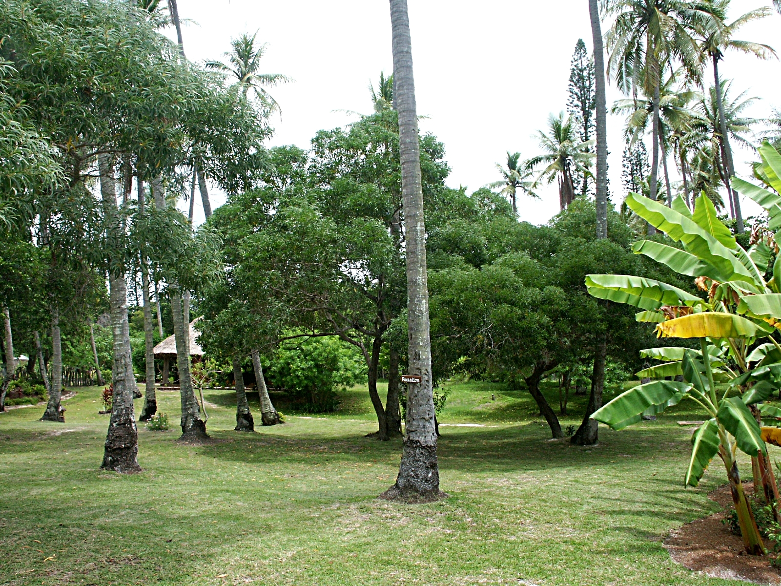 Santalum austrocaledonicum à l'Ile des Pins, au centre de la photographie. Le santal doit parasiter les palmiers et les graminées présentes. Ile des Pins - Nouvelle-Calédonie - Province Sud